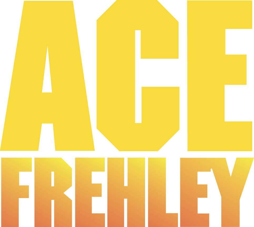 Ace Frehley Solo Project Logo